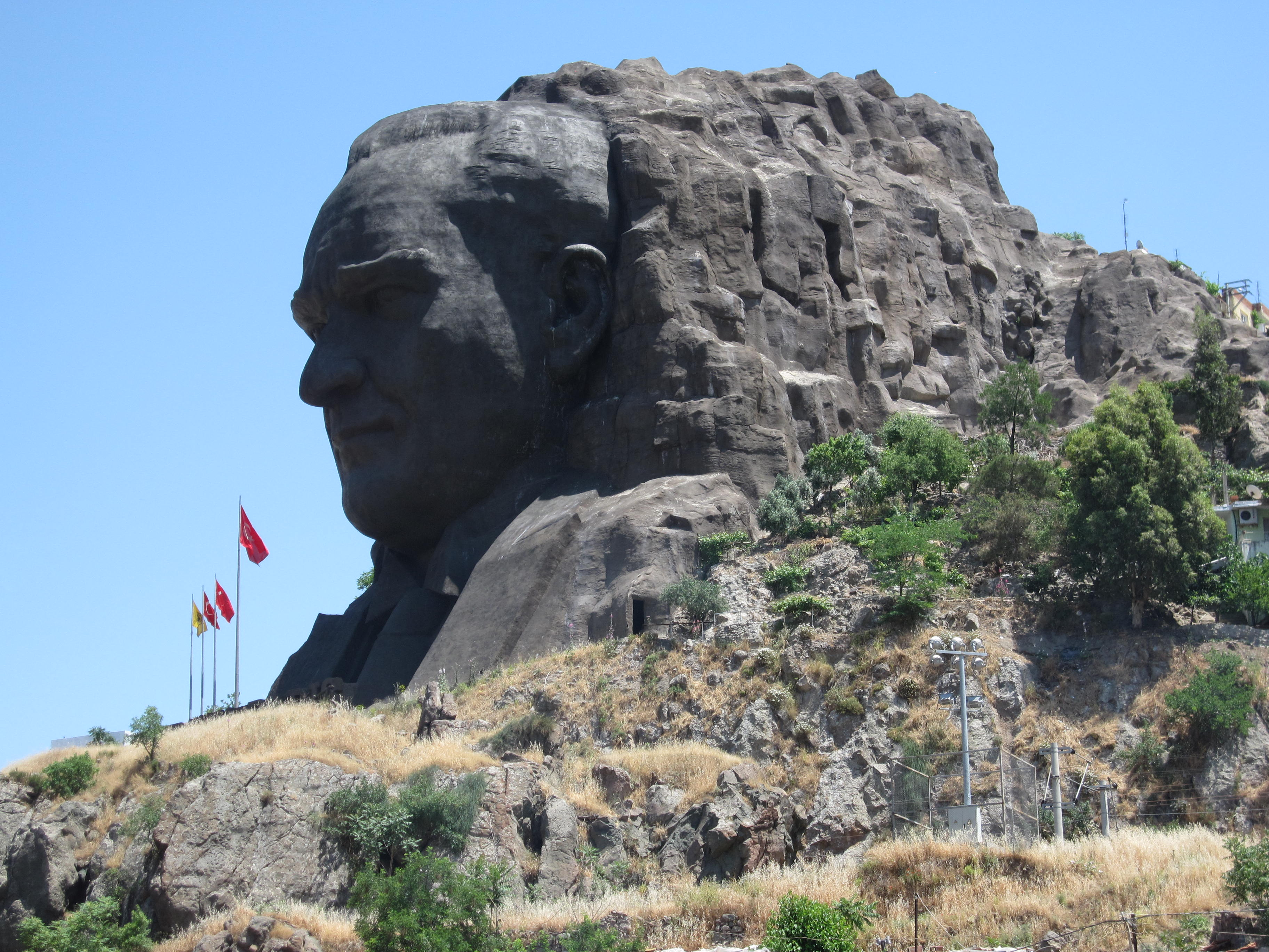 Ataturk in Izmir